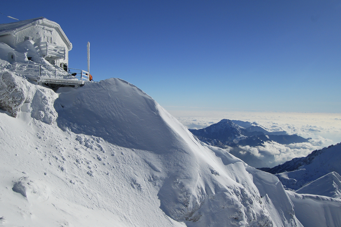 Rifugio Brioschi completamente innevato all'esterno sulla cima del monte Grignone.